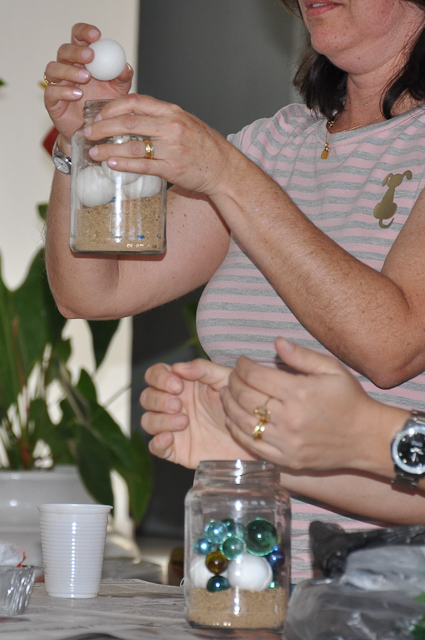 Ritual Espiritista con huevos en un centro espiritista de Brasil